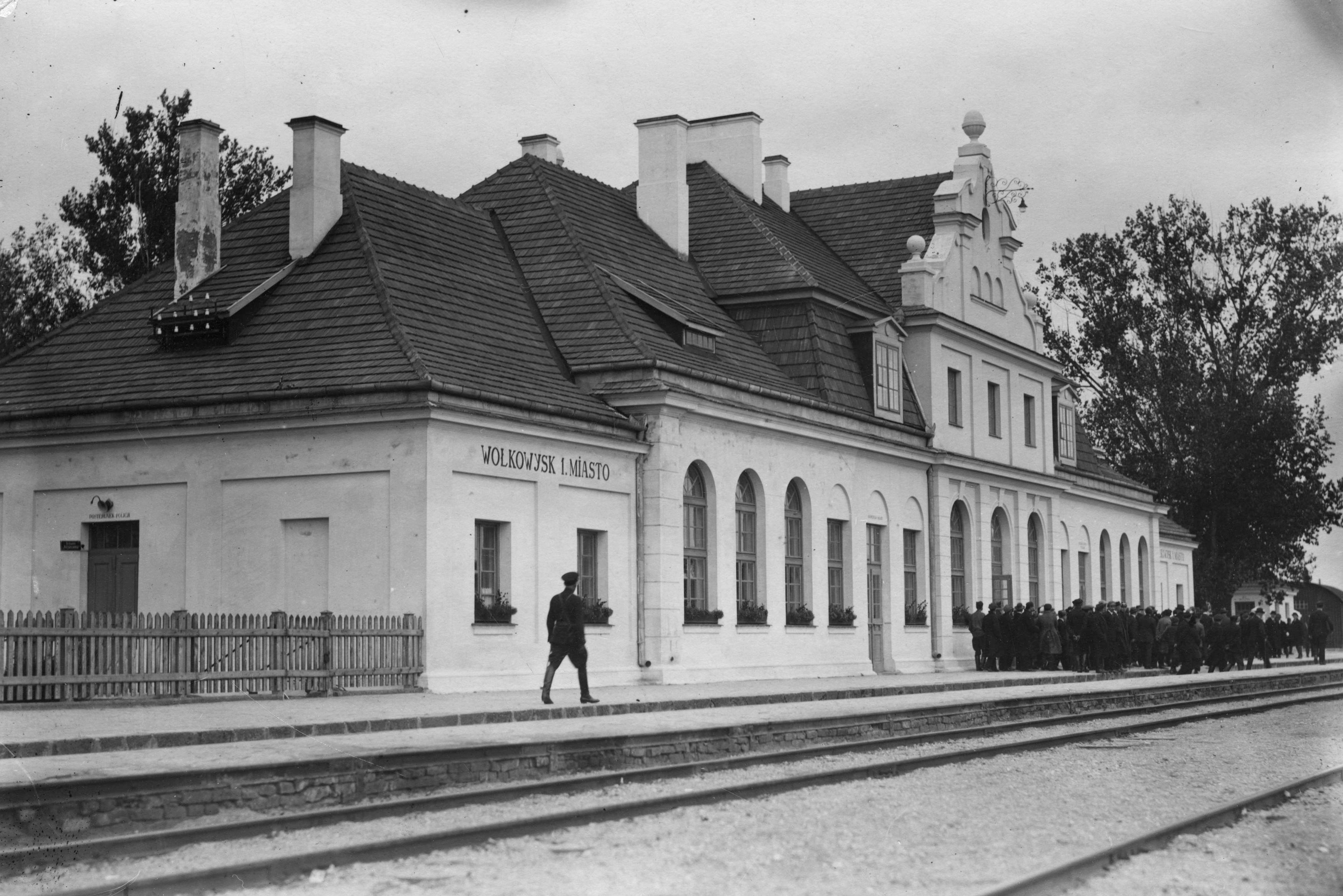 Беларуская (тарашкевіца): Ваўкавыск (Vaŭkavysk), вуліца Чыгуначная (vulica Čyhunačnaja). Станцыя Ваўкавыск Места